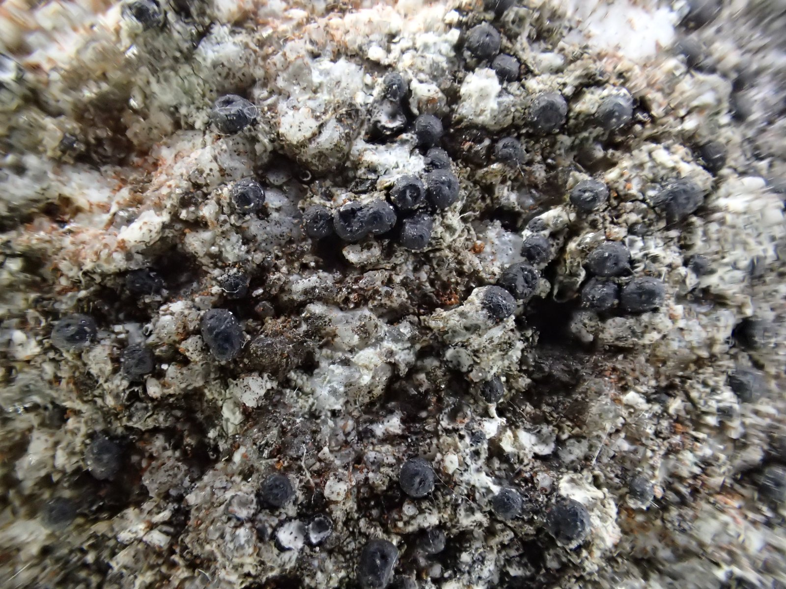 Acrocordia macrospora (Goulien, Finistère, Bretagne, France)